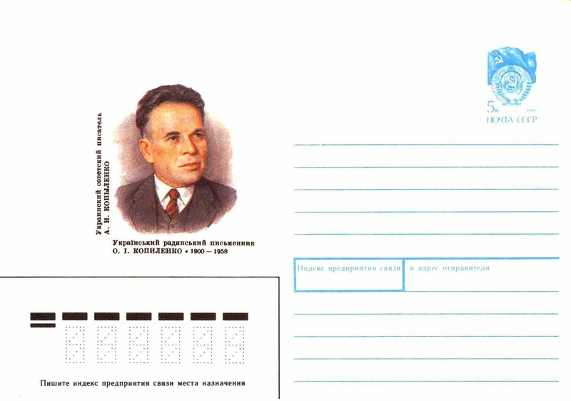 Маркированный почтовый конверт Министерства связи СССР. 90 лет со дня рождения украинского советского писателя А. И. Копыленко со стандартной почтовой маркой 5 копеек